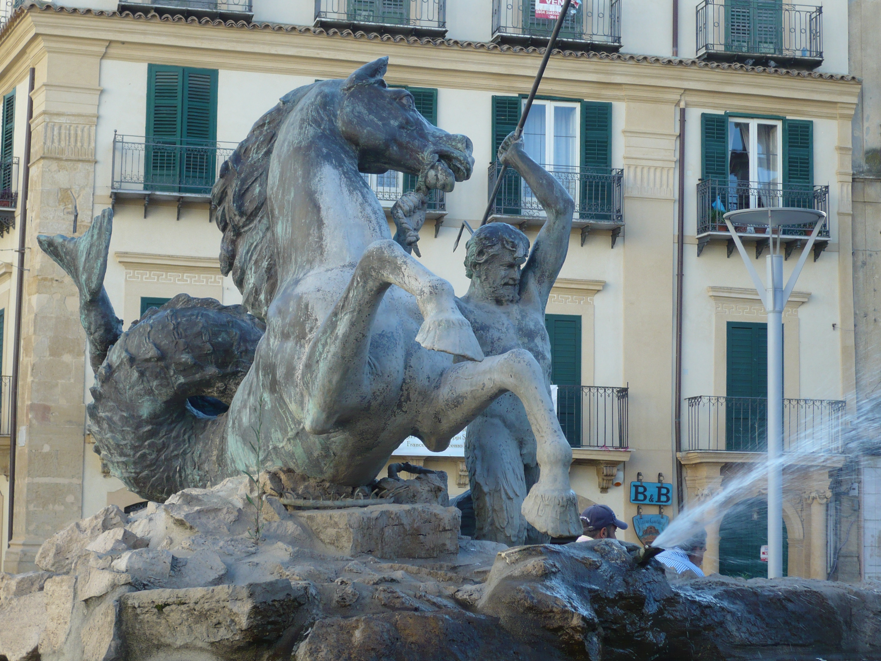 Fontana del Tritone a Caltanissetta: Statua di Michele Tripisciano .